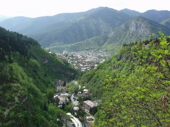 Borjomi